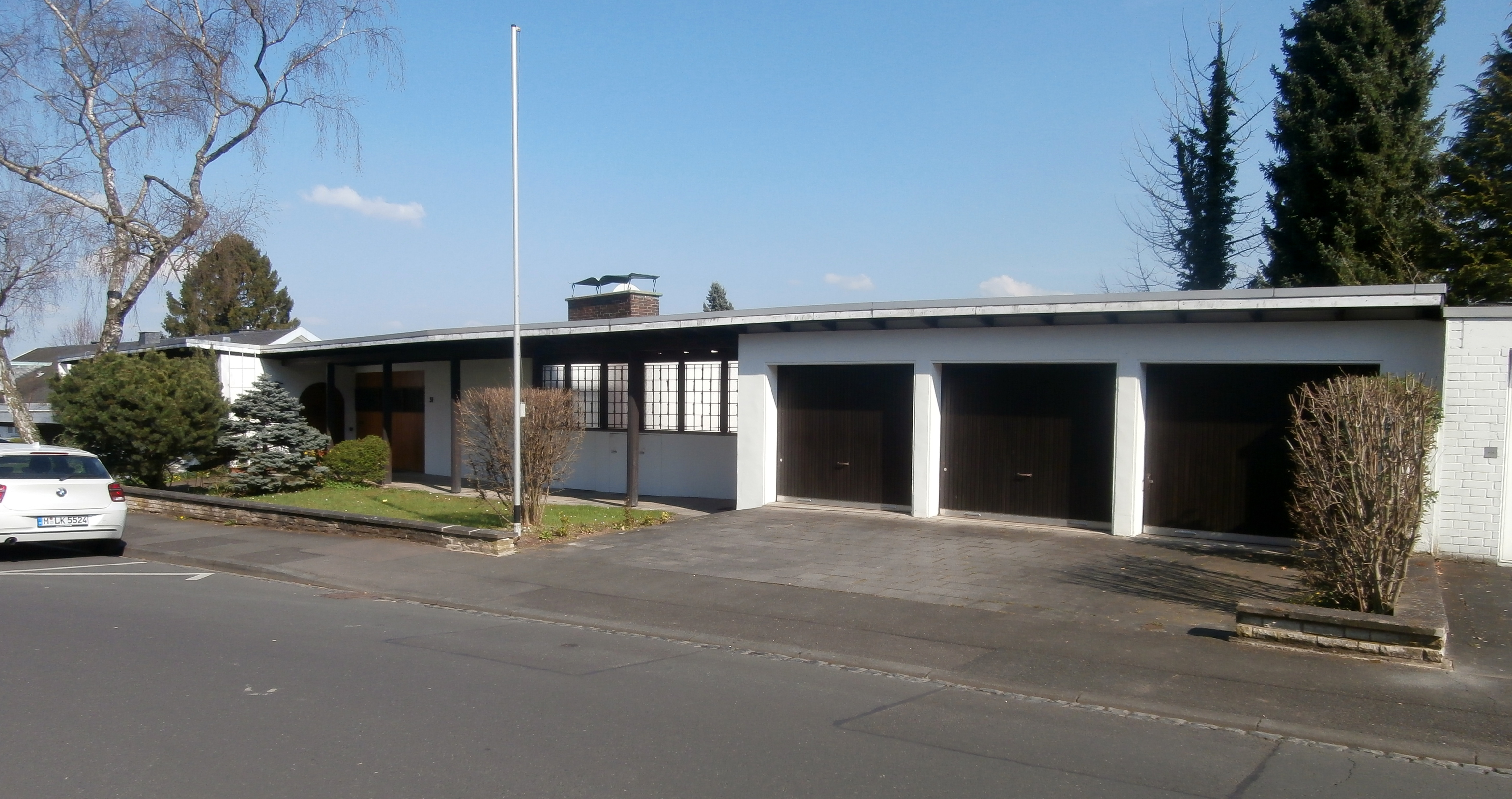 Ehemalige Residenz der Botschaft von Namibia, Am Stadtwald 31, Schweinheim, Bad Godesberg